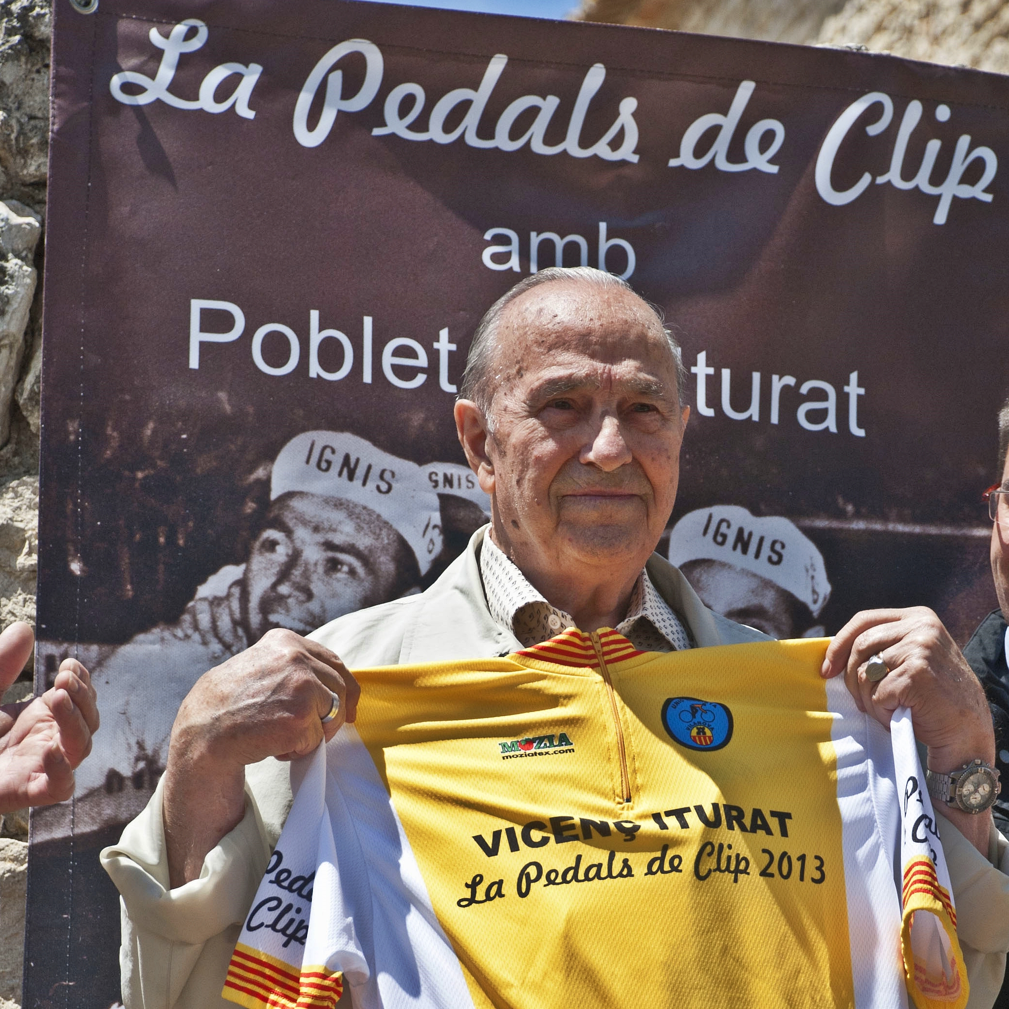 Foto de la Pedals de Clip el dia del seu homenatge